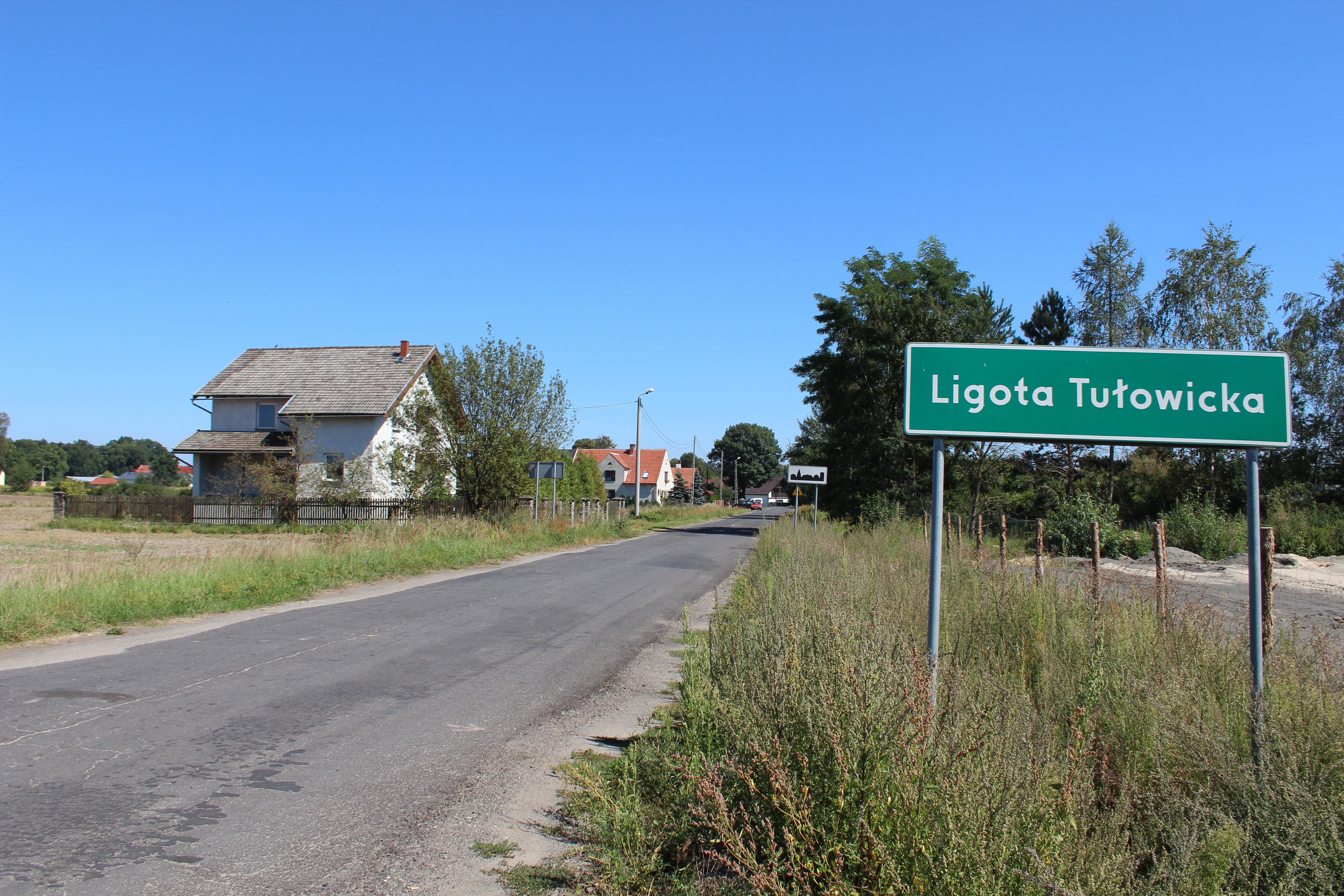 Ligota Tułowicka - wieś w Polsce w województwie opolskim, w powiecie opolskim w gminie Tułowice.